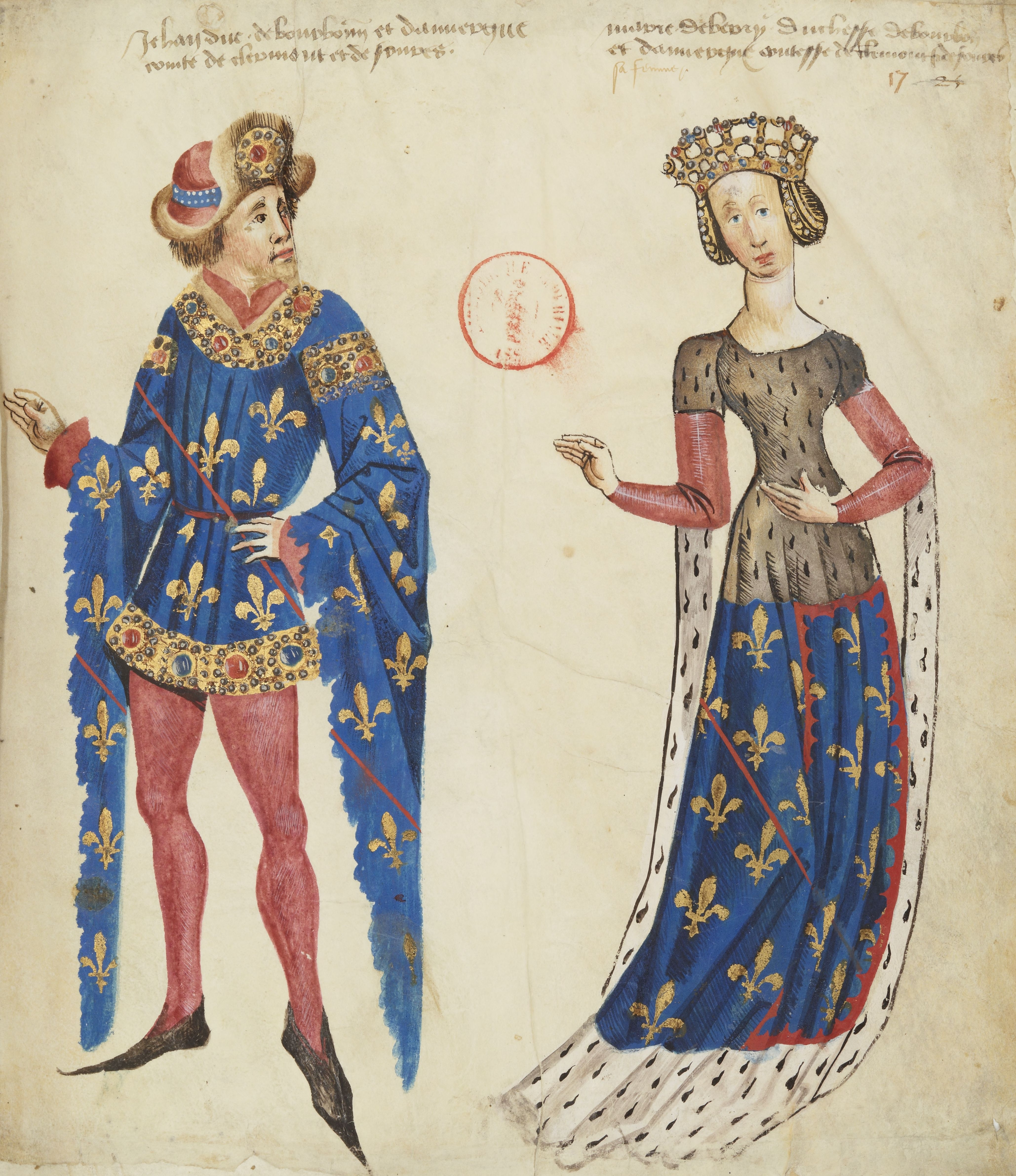 Jean I de Bourbon et Marie de Berry: Guillaume Revel, Armorial d'Auvergne f 17r